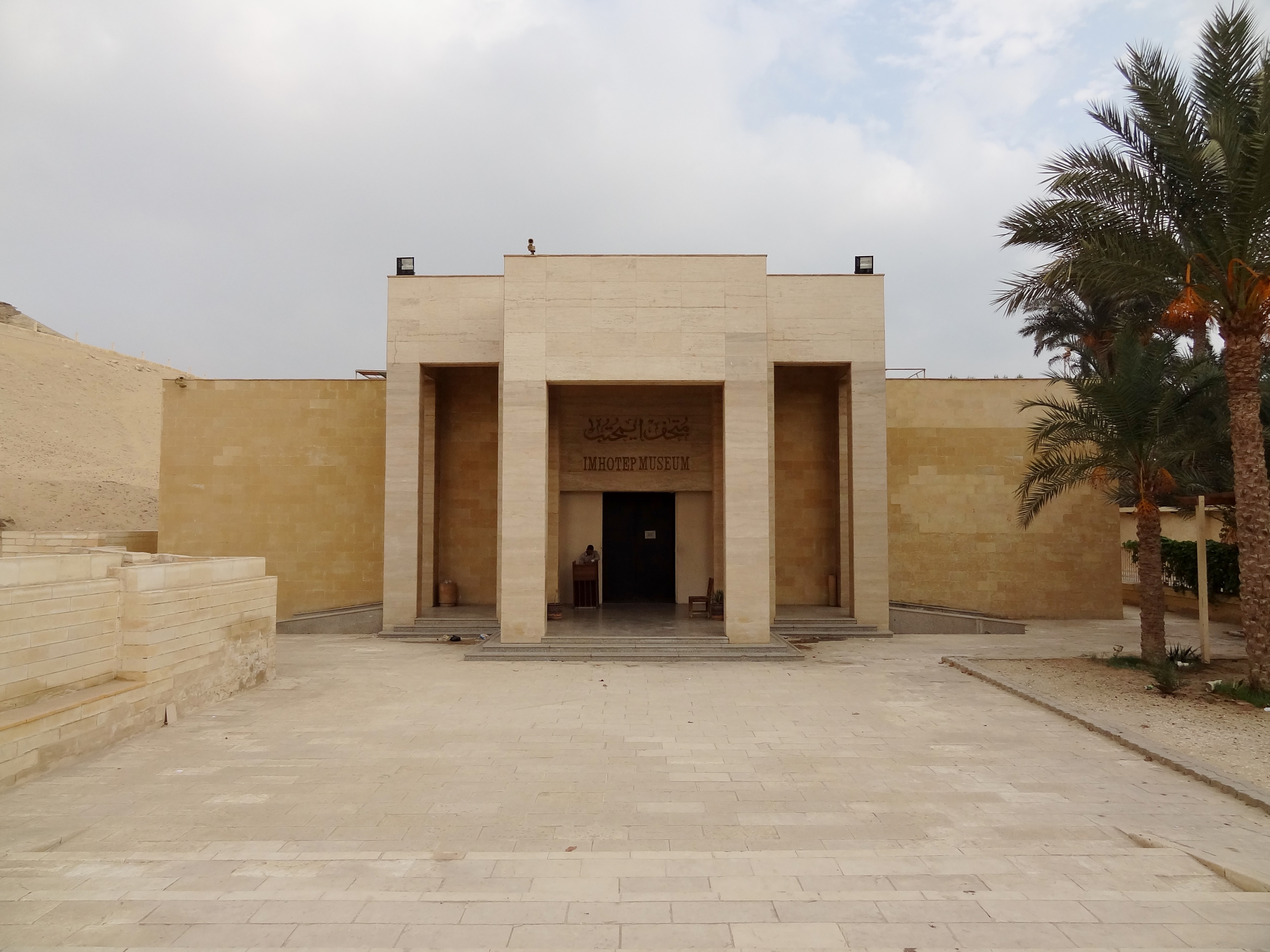 Imhotep-Museum in Sakkara, Ägypten